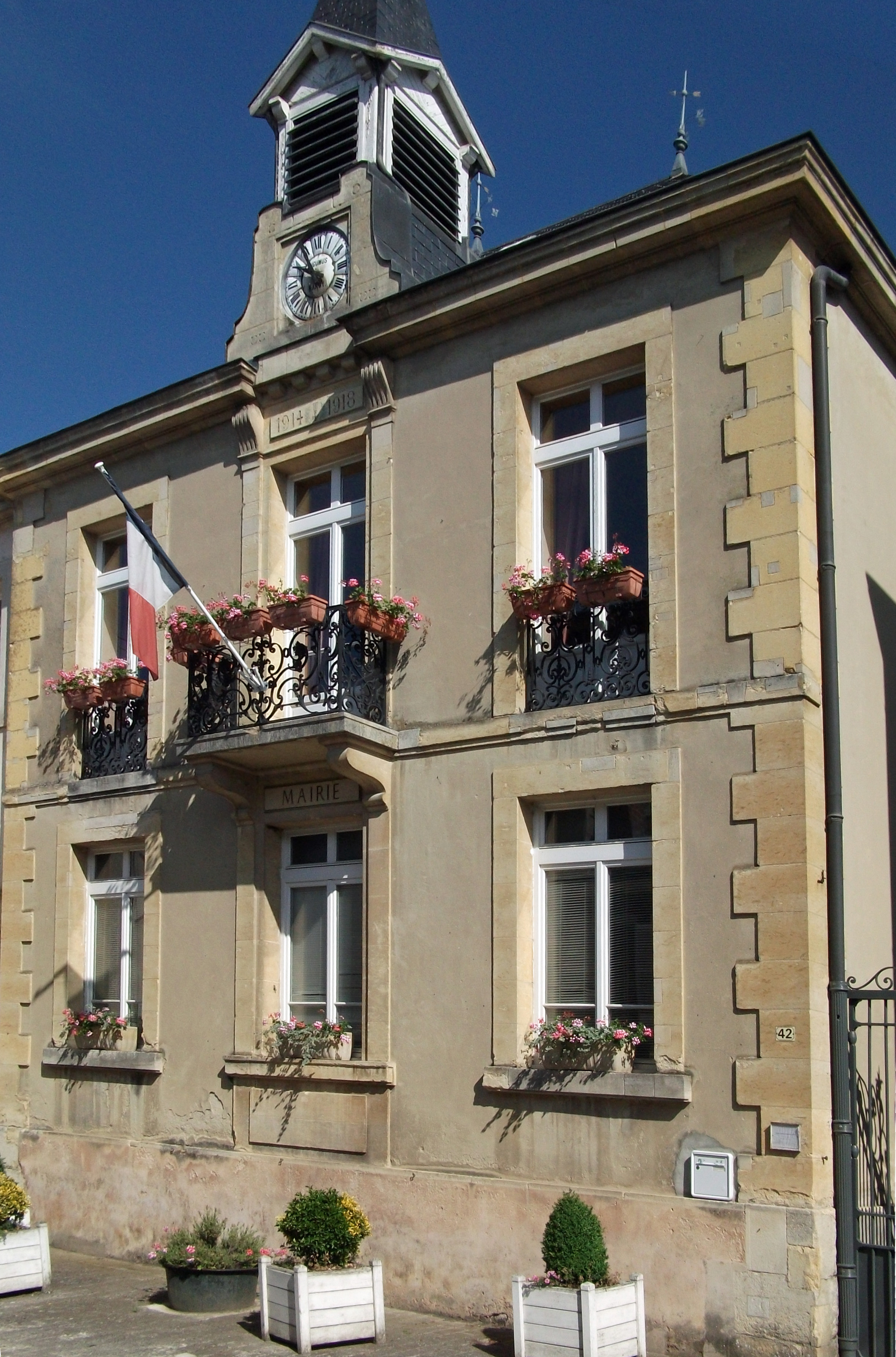 la mairie à Chenay.